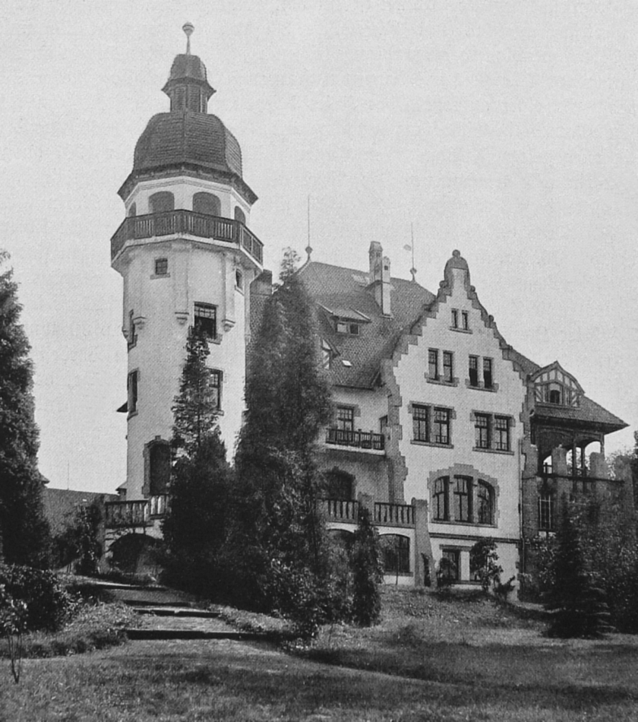 Herrenhaus mit Turm des Ritterguts Königshof